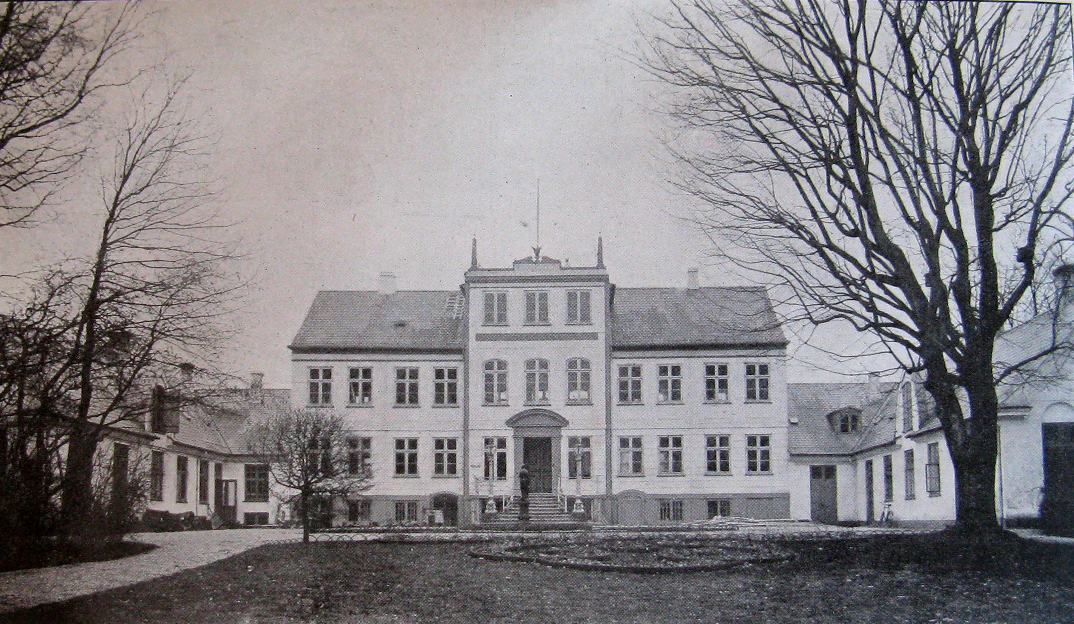 Schæffergården er et landsted på Jægersborg Allé 166 i Gentofte opført i rokokostil 1755-1756